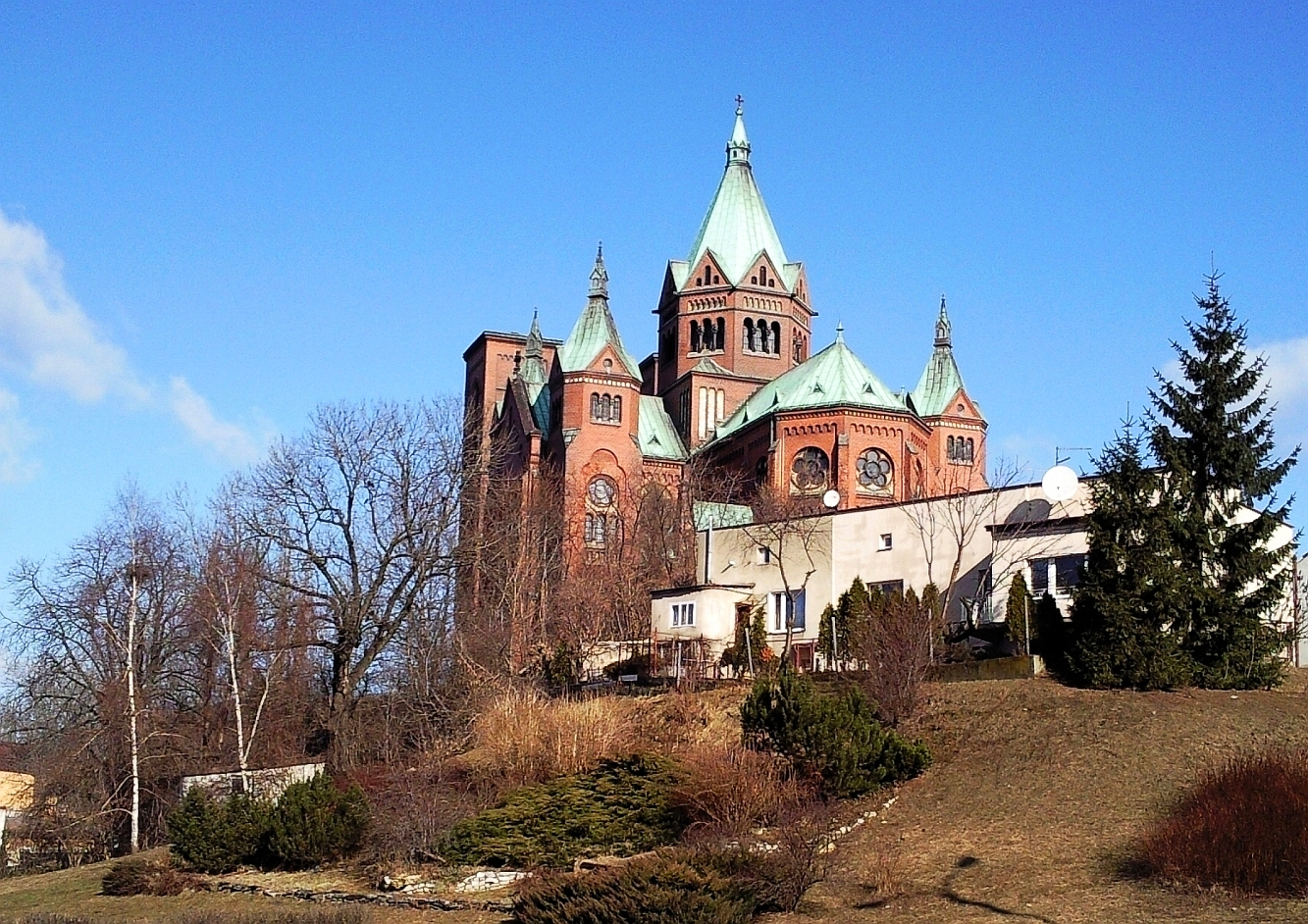 Pierwsza wzmianka o istnieniu parafii pw. św. Stanisława BM w Czeladzi pochodzi z 1260 r. kiedy wspomniany został wtedy tamtejszy kapelan, Stefan. Pierwotnie istniał drewniany kościół, który przetrwał do XVI w., kiedy zastąpiono go murowanym. Była to gotycka, otynkowana świątynia o krótkiej nawie i dłuższym, trójbocznie zamkniętym prezbiterium. Kościół ten po wybudowaniu nowej, okazałej świątyni w 1916 r. został rozebrany. Obecna świątynia o cechach neoromańskich, została wybudowana w latach 1904-1913, według projektu Tomasza Pajzderskiego i Hugo Kudera. Jej uroczystego poświęcenia (konsekracji) kościoła 28 września 1958 r. dokonał biskup częstochowski Zdzisław Goliński. Monumentalny kościół wybudowany został na planie krzyża łacińskiego z wielobocznie zamkniętym prezbiterium oraz wieżami umieszczonymi po bokach transeptu i na skrzyżowaniu z nawą główną oraz przy wejściu. We wnętrzu na uwagę zasługuje m.in. polichromia wykonana w latach 1963-1968 przez Macieja Makarewicza oraz bogata dekoracja rzeźbiarska. W świątyni od XVII w. istnieje kult Matki Bożej Pocieszenia. Dekret zezwalający na publiczne oddawanie czci Najświętszej Maryi Pannie w Jej wizerunku wydał 5 maja 1651 r. biskup krakowski Piotr Gembicki. Kult trwał nieprzerwanie do 1923 r., a jego odnowienie nastąpiło w 1988 r. z udziałem metropolity częstochowskiego Stanisława Nowaka.